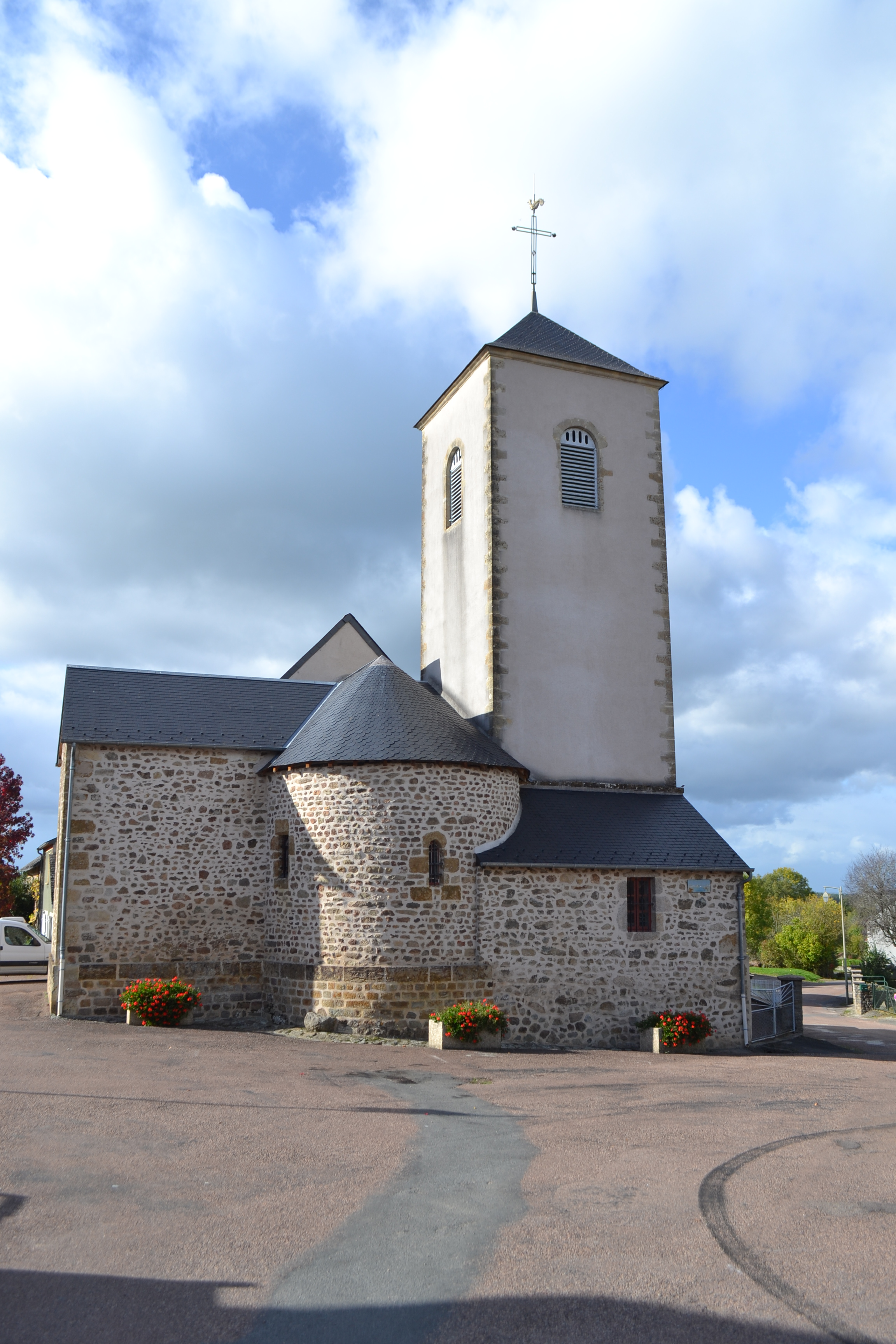 Eglise de Blismes, Nièvre.